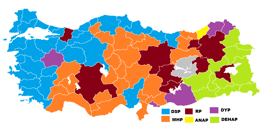 1999 genel seçimleri sonucunun Türkiye iller haritasında gösterimi.